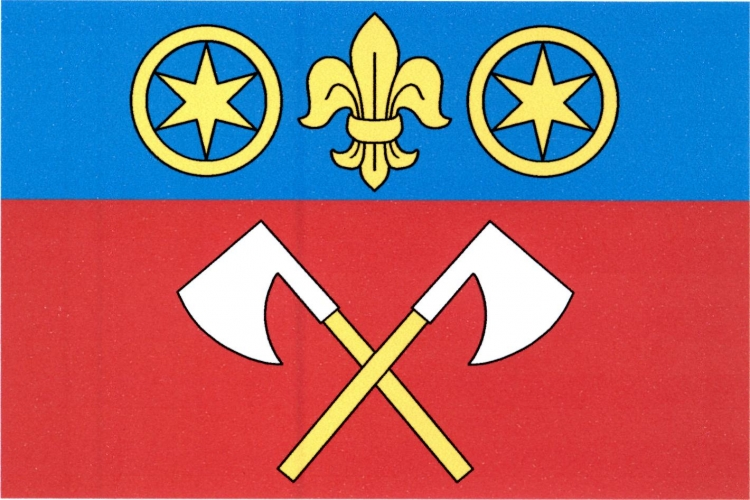 Vlajka, Skočice, okres Strakonice